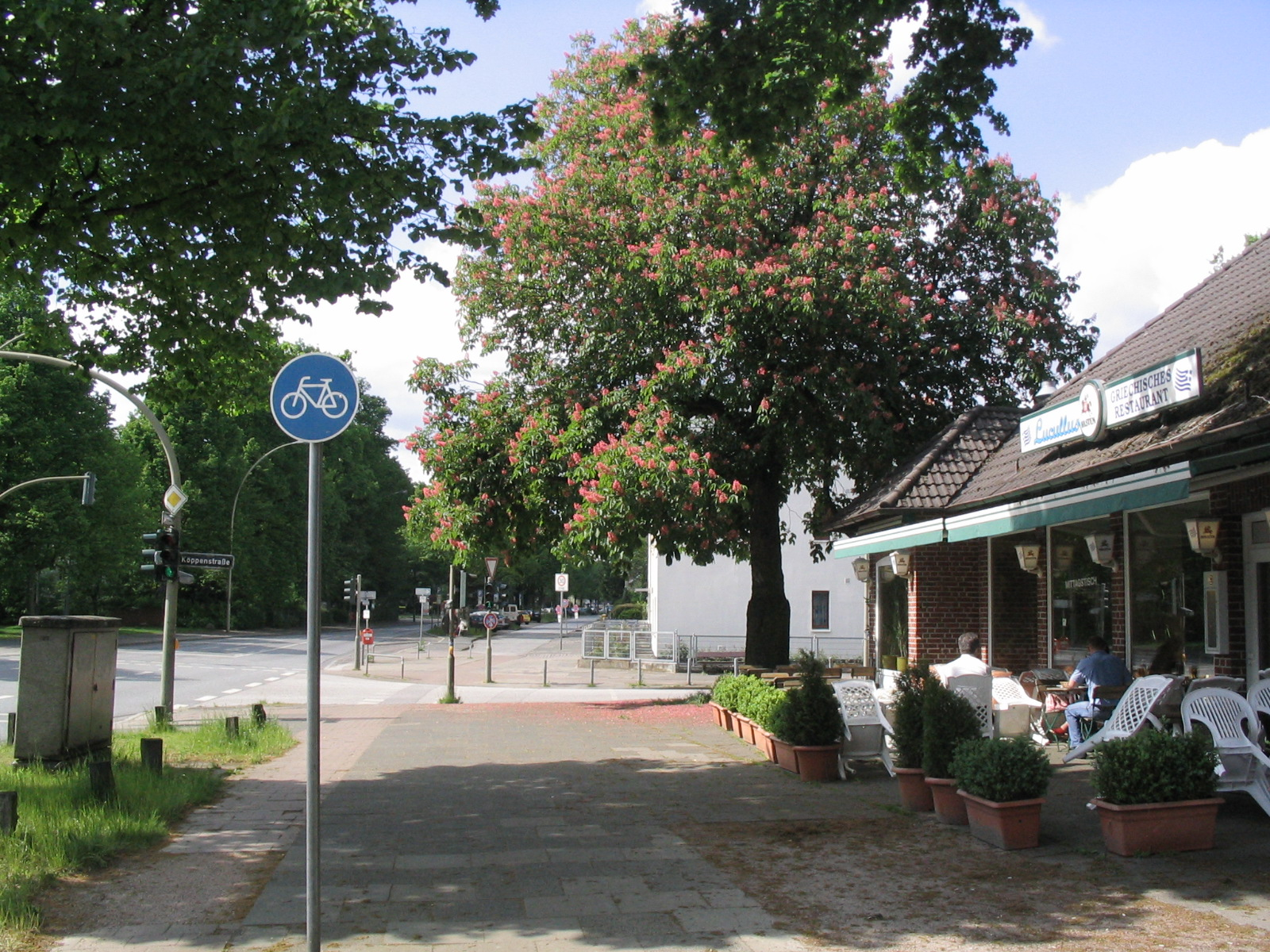 Hamburg-Groß Borstel, Borsteler Chausse. Die auf dem Bild noch als "Griechisches Restaurant" annoncierte Gaststätte beherbergt heute das Ägyptische Restaurant "Tito".